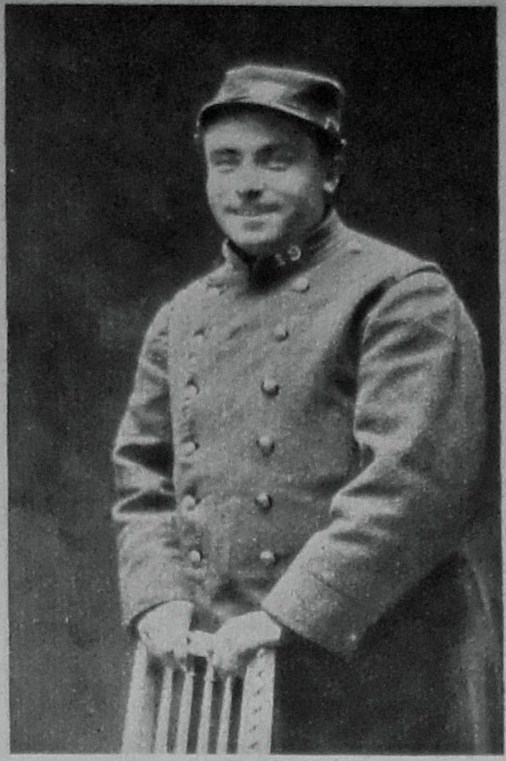 Le Miroir N° 72 page 15 Octave Lapize cycliste.